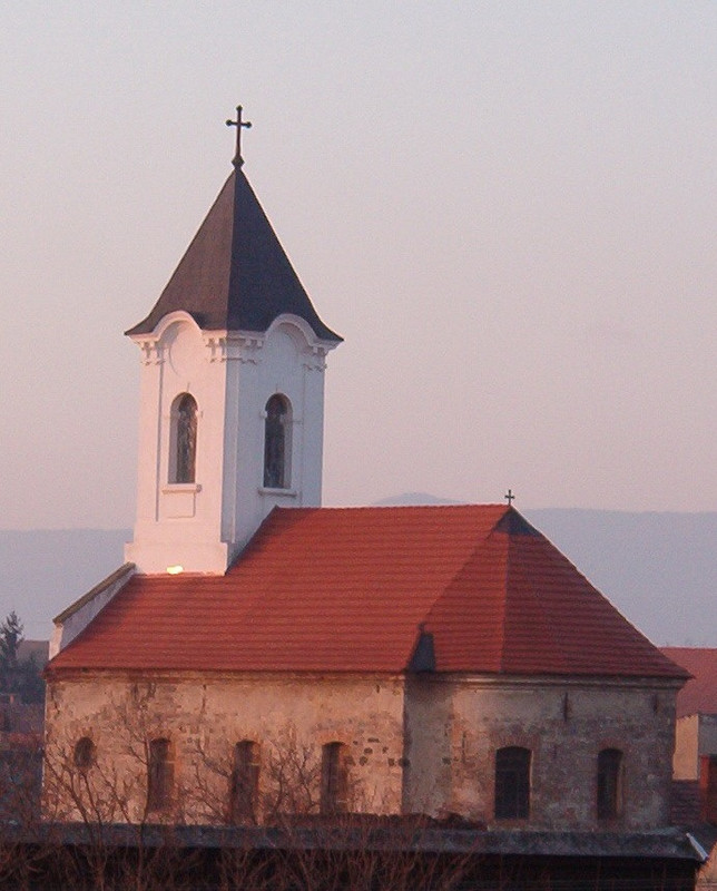 Görögkeleti templom (Gyöngyös, Vachott Sándor u. 12.) This is a photo of a monument in Hungary, Identifier: 5710